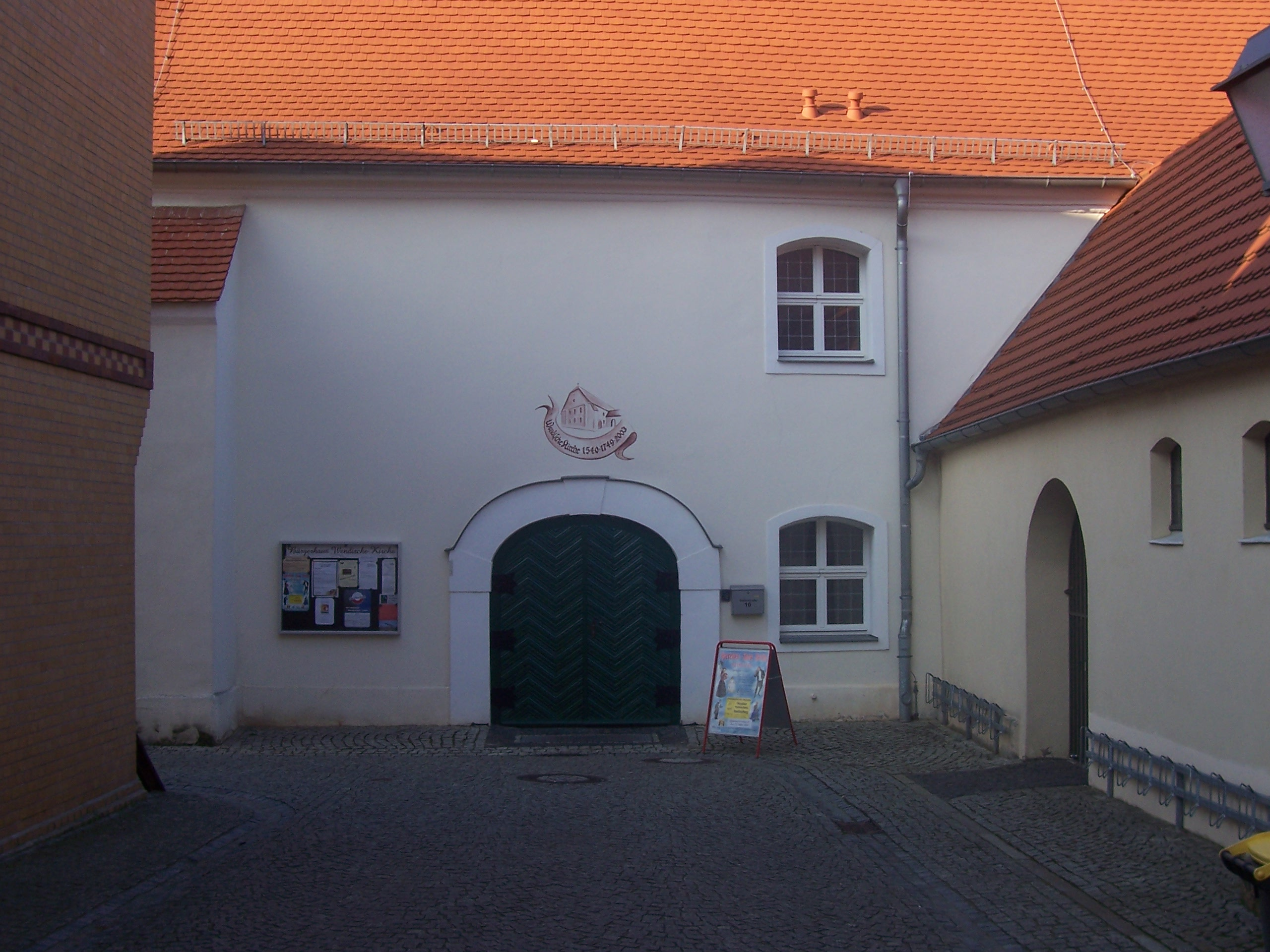 Die ehemalige Wendische Kirche in Senftenberg, heute genutzt als Bürgerhaus.